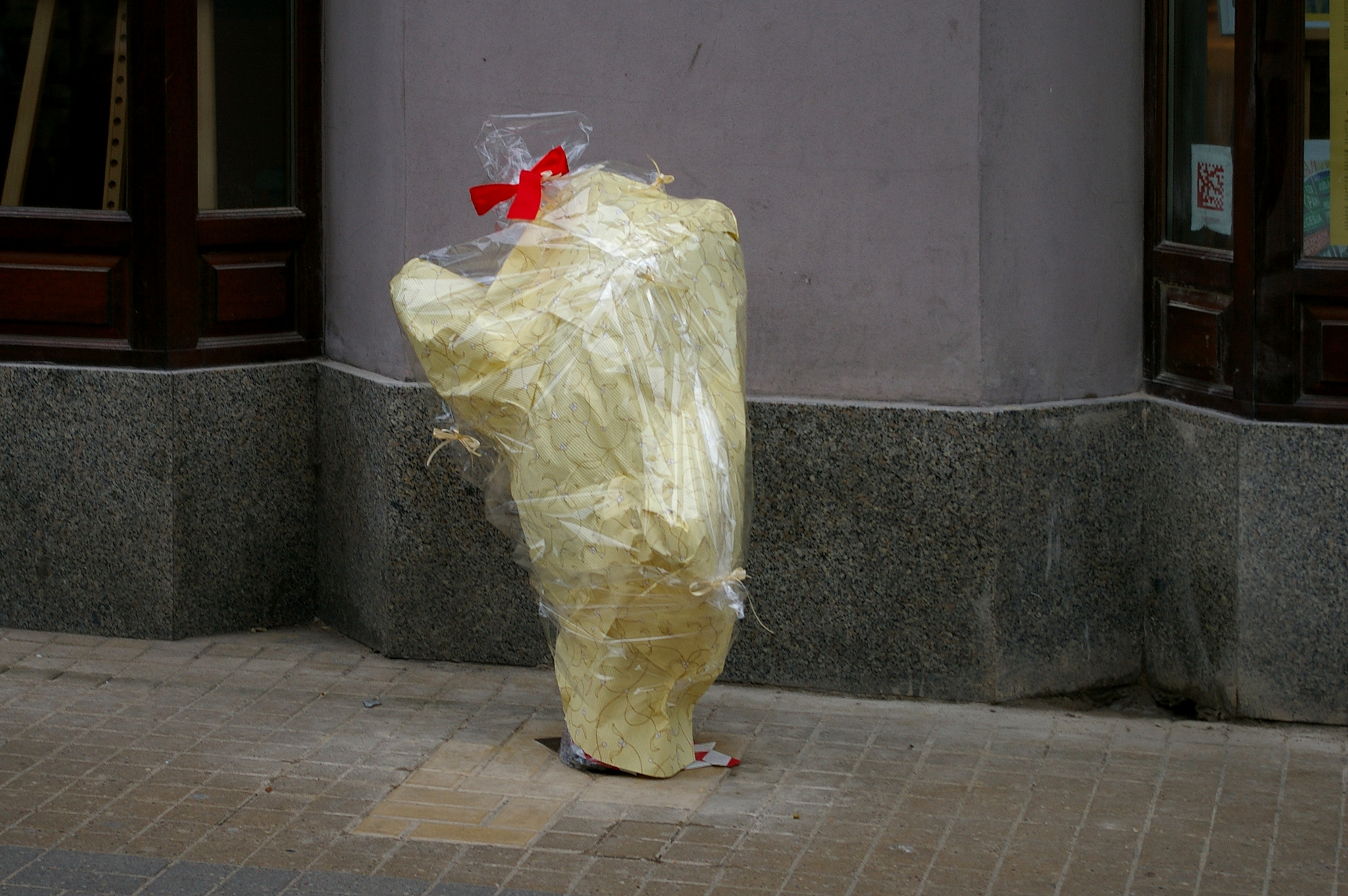 Święto Łodzi 2010